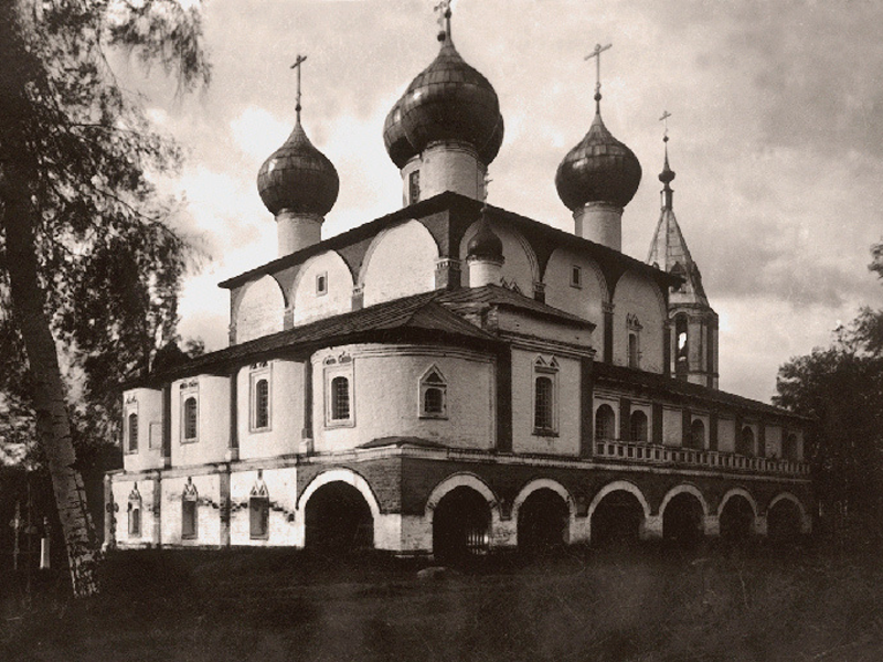 Монастырь Богоявления, что на острову (1690-е гг.)(ныне с. Хопылево Рыбинского района)По преданию, здесь был крещён адмирал Ф. Ф. Ушаков.